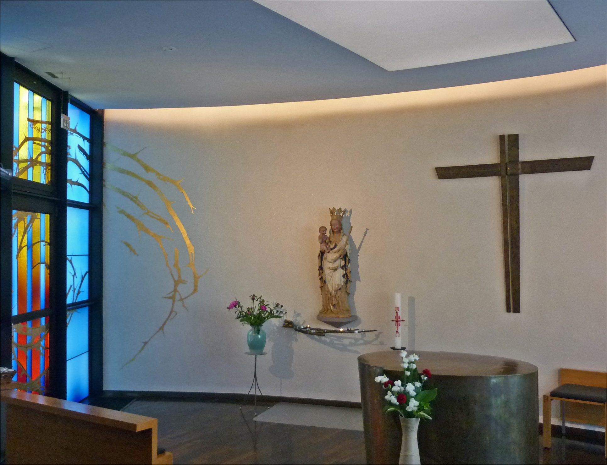 Kapelle im St. Joseph-Stift Dresden; Muttergottesfigur mit Kind - spätgotische Plastik aus Lindenholz, urspr. in der mittelalterlichen Pfarrkirche von Radibor, Kreis Bautzen.